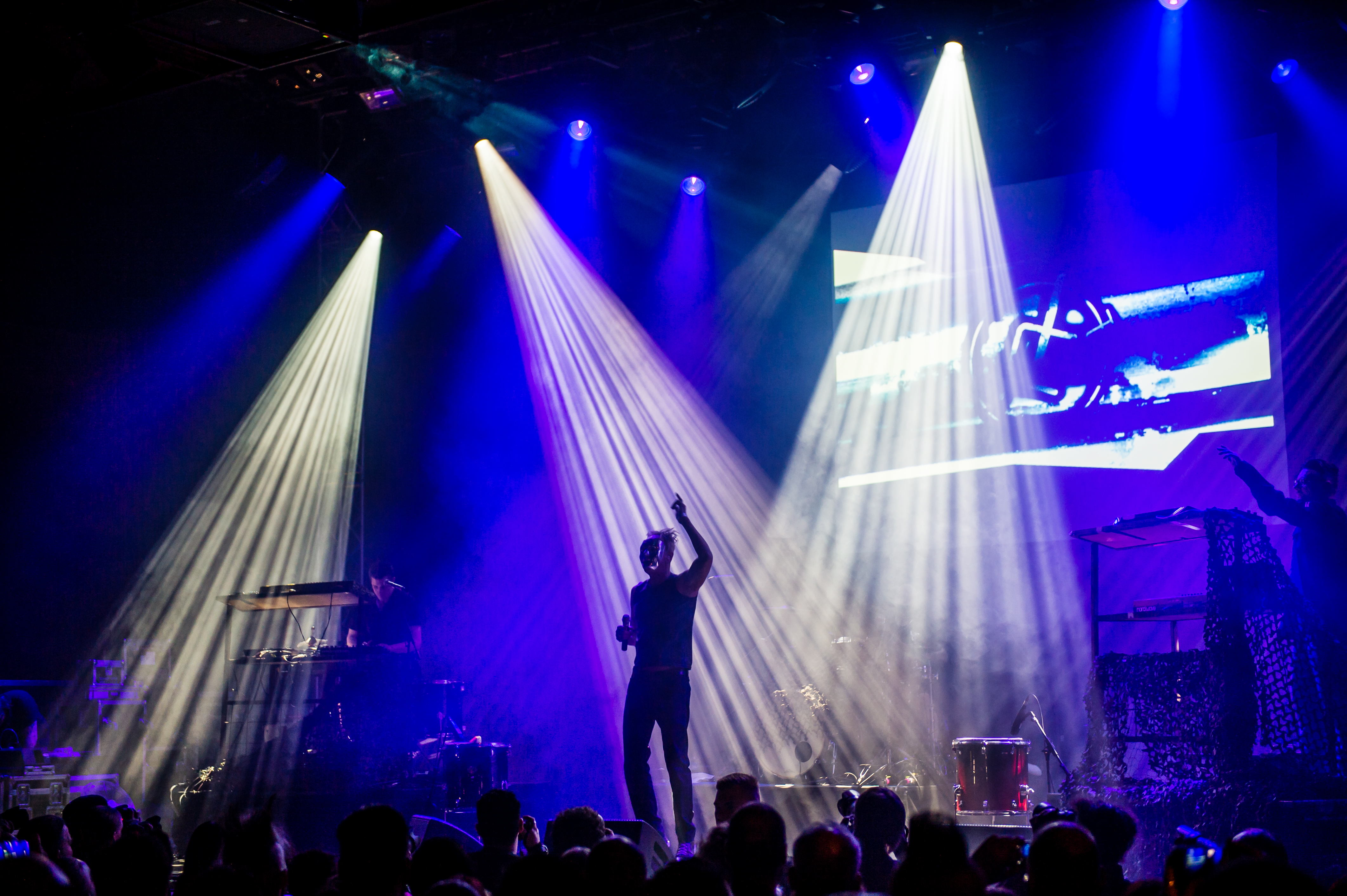 E-Tropolis Festival 2016; Oberhausen Turbinenhalle - Frontline Assembly